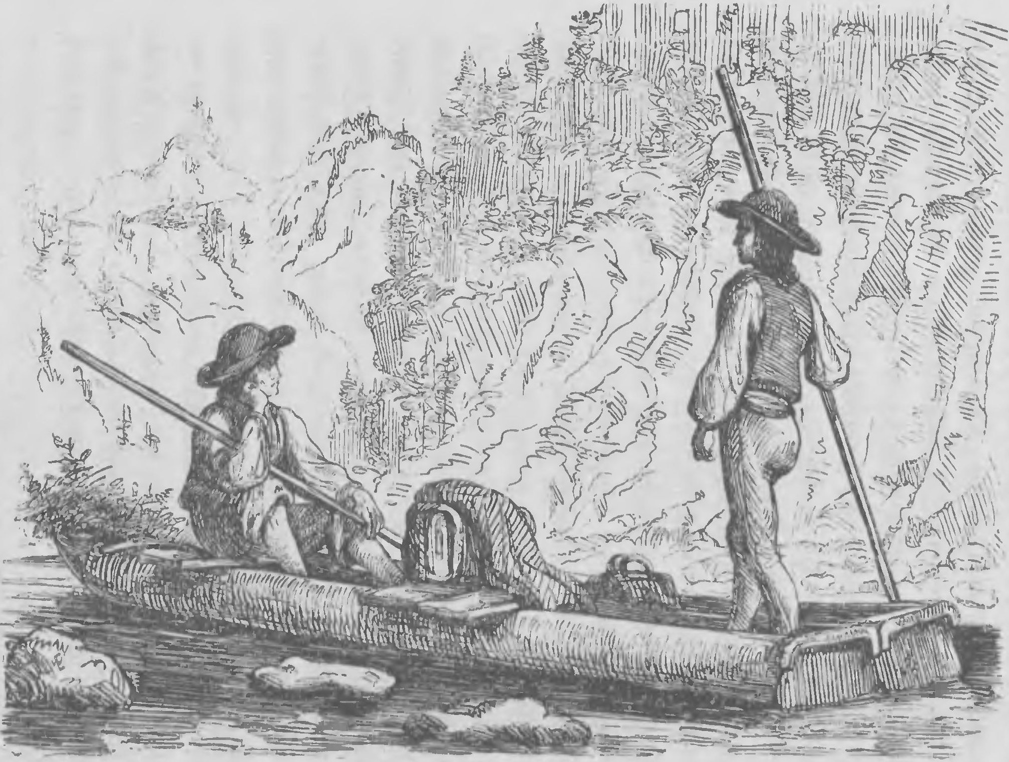 Ilustracja do „Illustrowanego przewodnika do Tatr, Pienin i Szczawnic” Walerego Eljasza-Radzikowskiego. Oryginalny opis:„Przewoźnicy w Pieninach”.